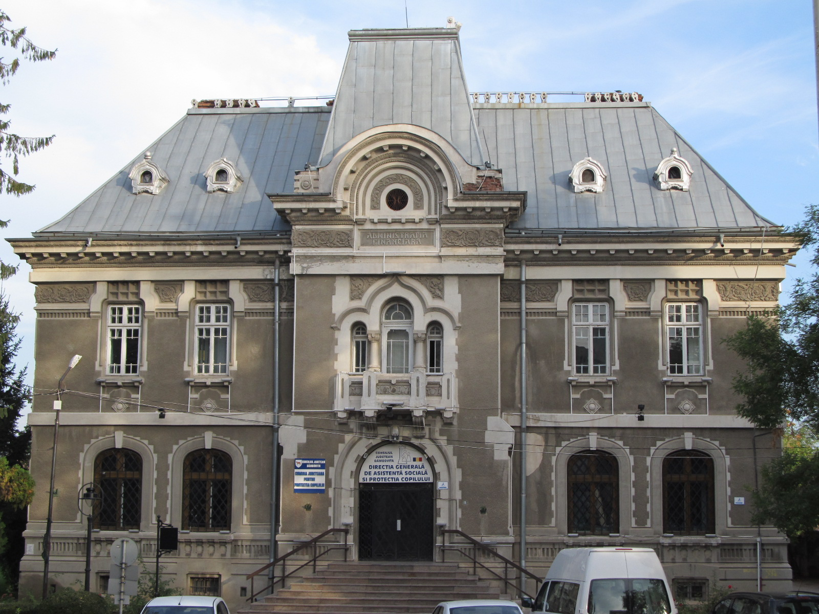 Fosta Banca Nationala, Str. Visarion I.C. 8, vedere din fata